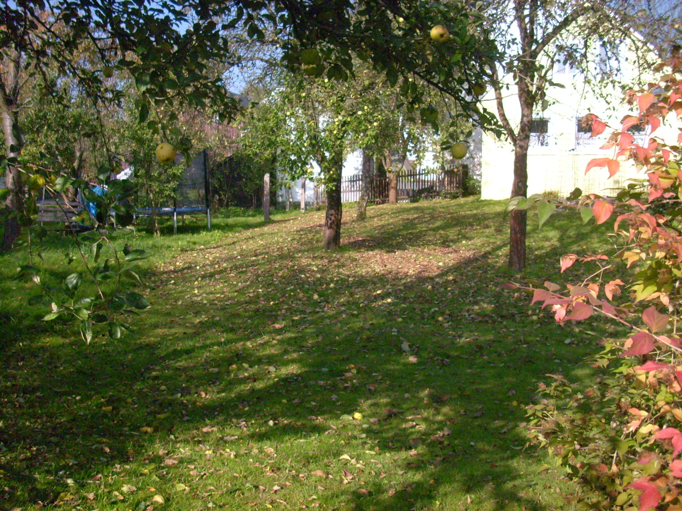 Reste des Kernhügels der Motte in Witzleshofen, Stadt Gefrees (Oberfranken)